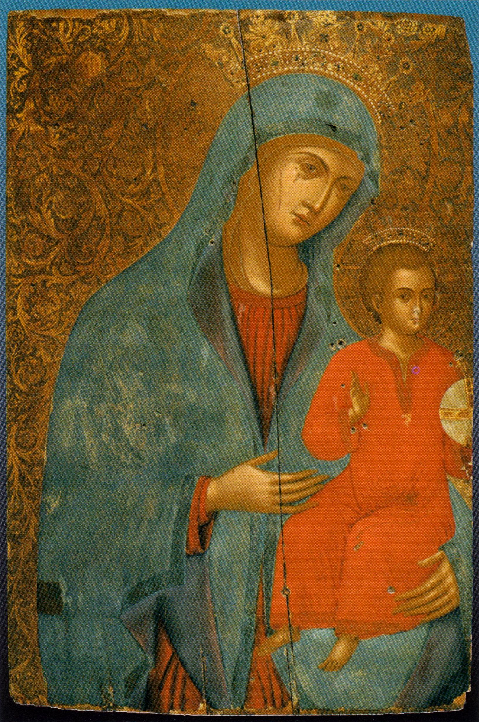 Icona dell'Hodighìtria di fine XVI secolo, tempera all'uovo su tavola, Piana degli Albanesi.